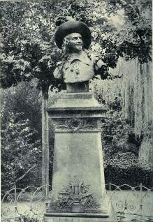 buste de Corteta, Agen